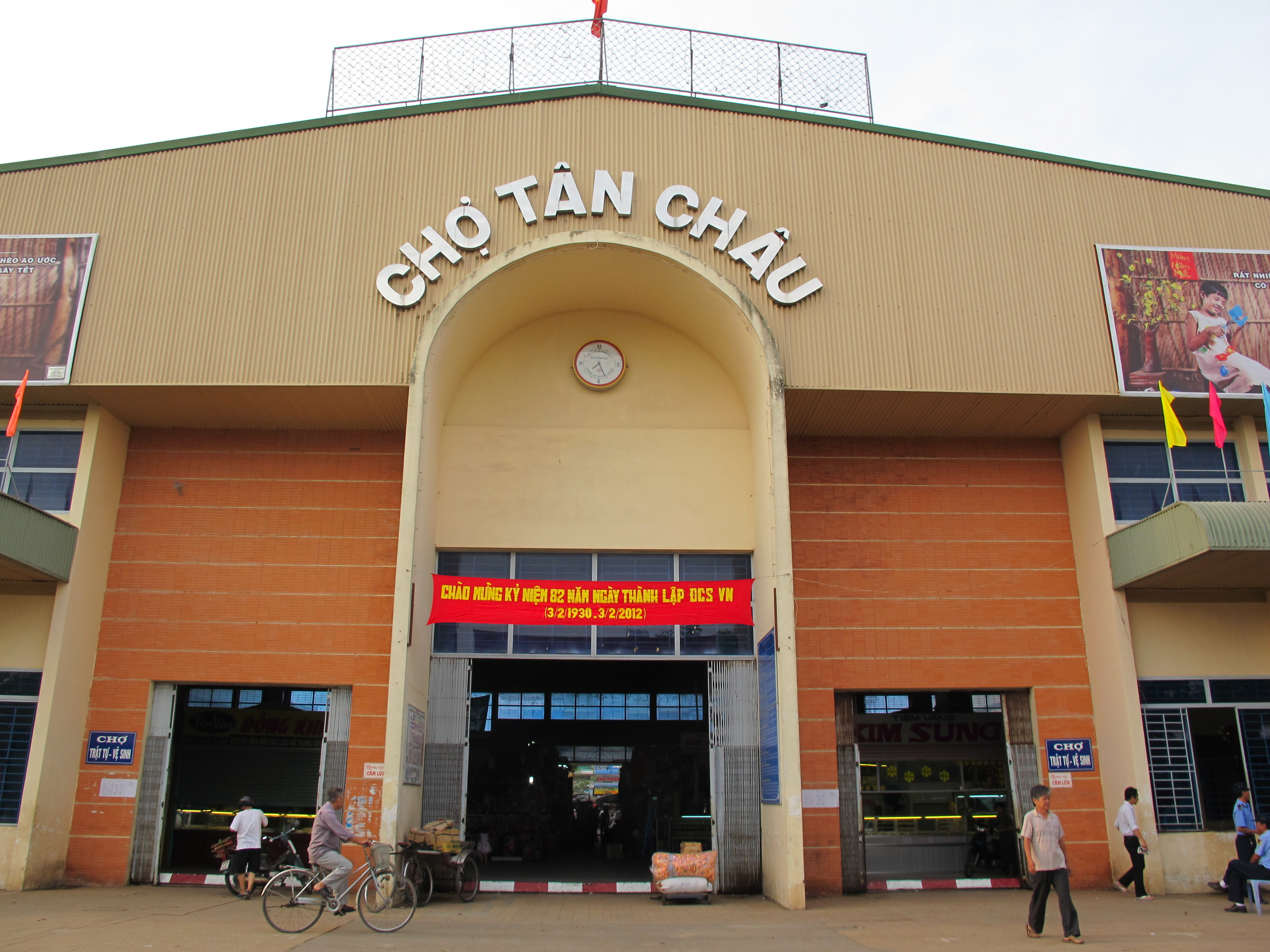 Chợ Tân châu,tỉnh an giang. việt nam,23/02/2012/Dyt